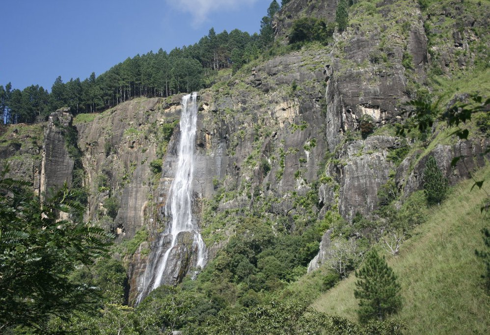 zee-guys-trip-2008